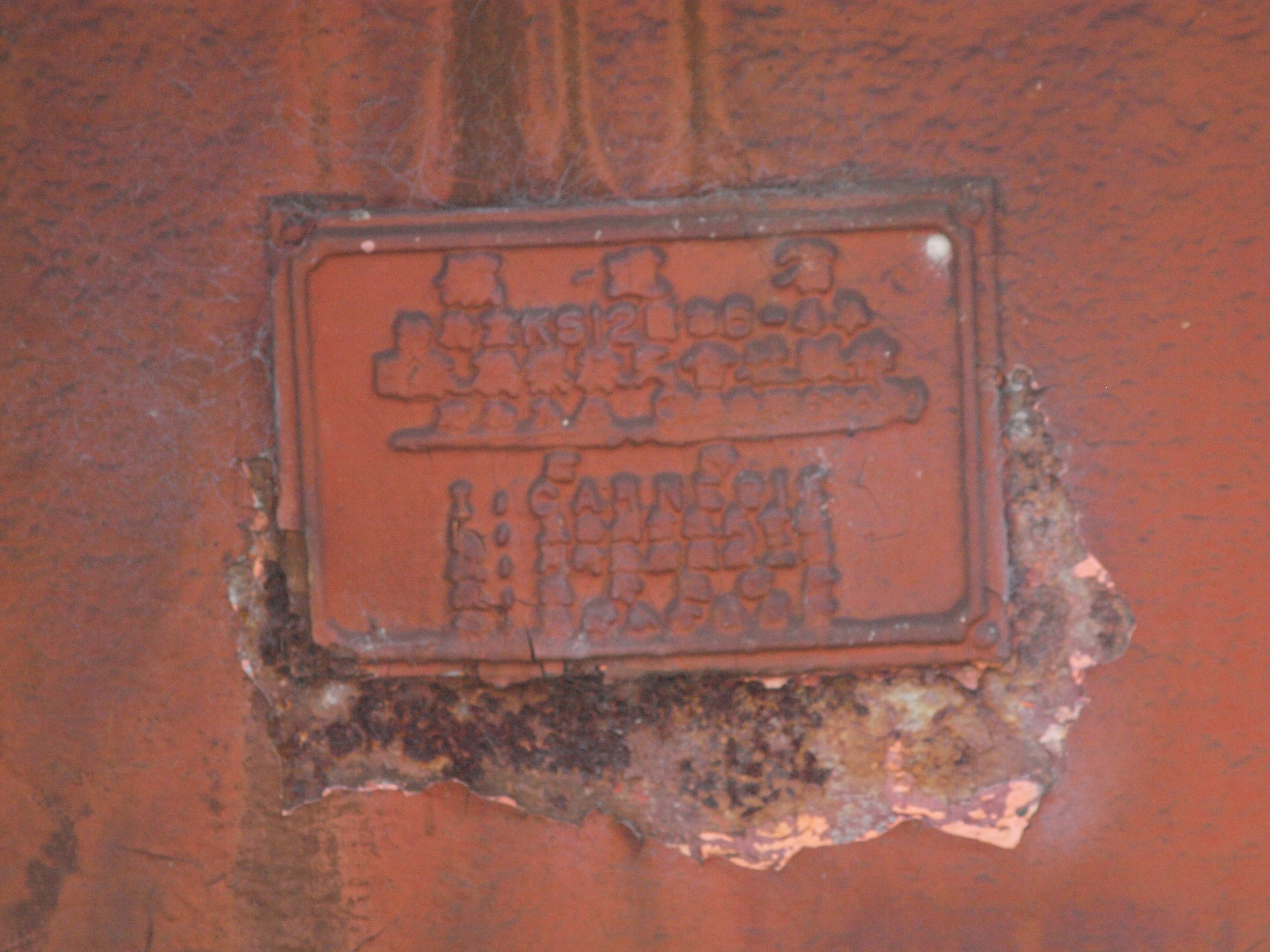 当該区間は１８８０年に後の国鉄によって開通し、１９１３年に後の京阪電鉄が乗り入れ、１９６９年に国鉄としては廃止となった。鉄道省（後の国鉄）によって設置された橋梁であることを示す銘盤である。